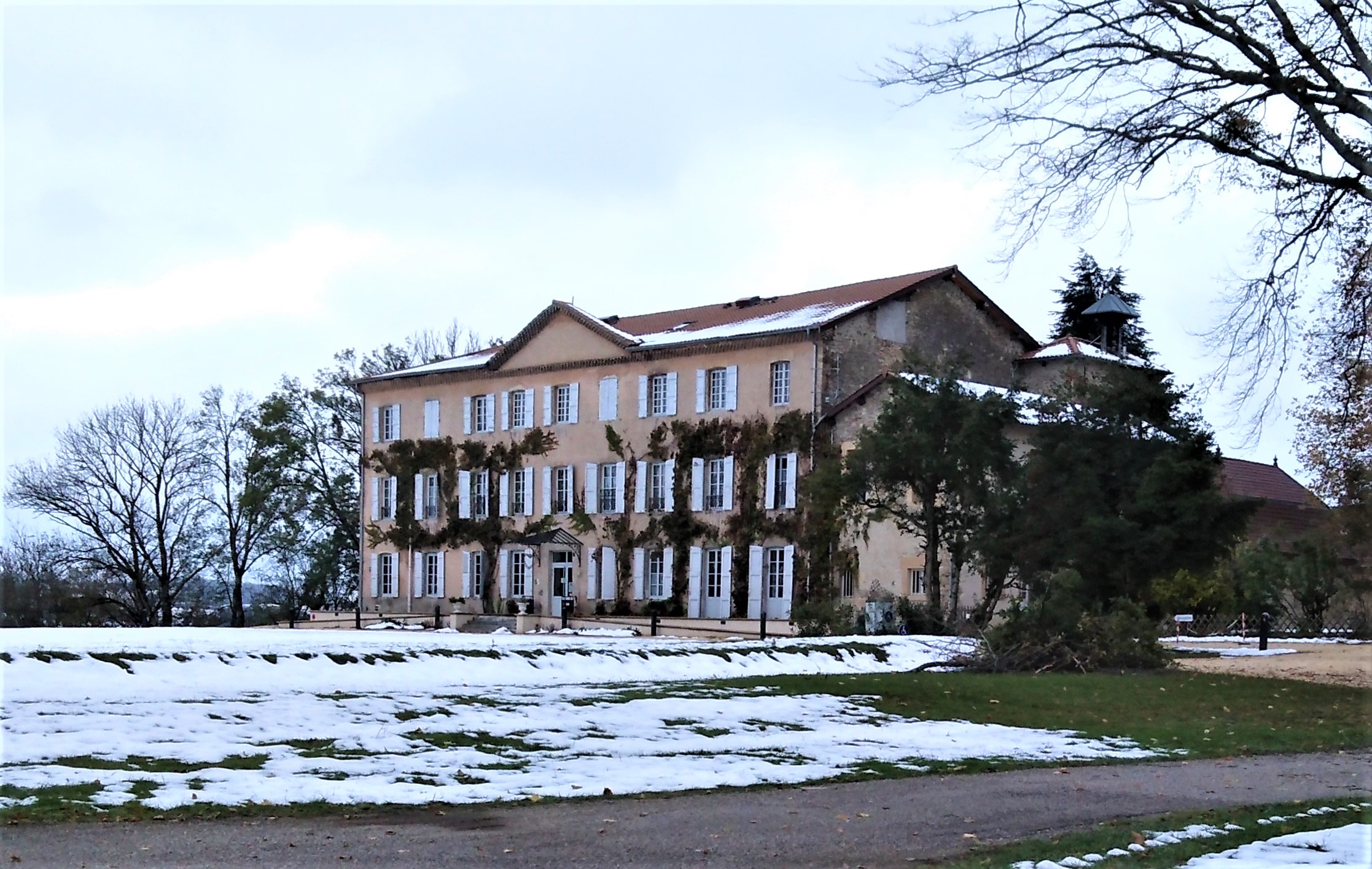 Château de Césargues